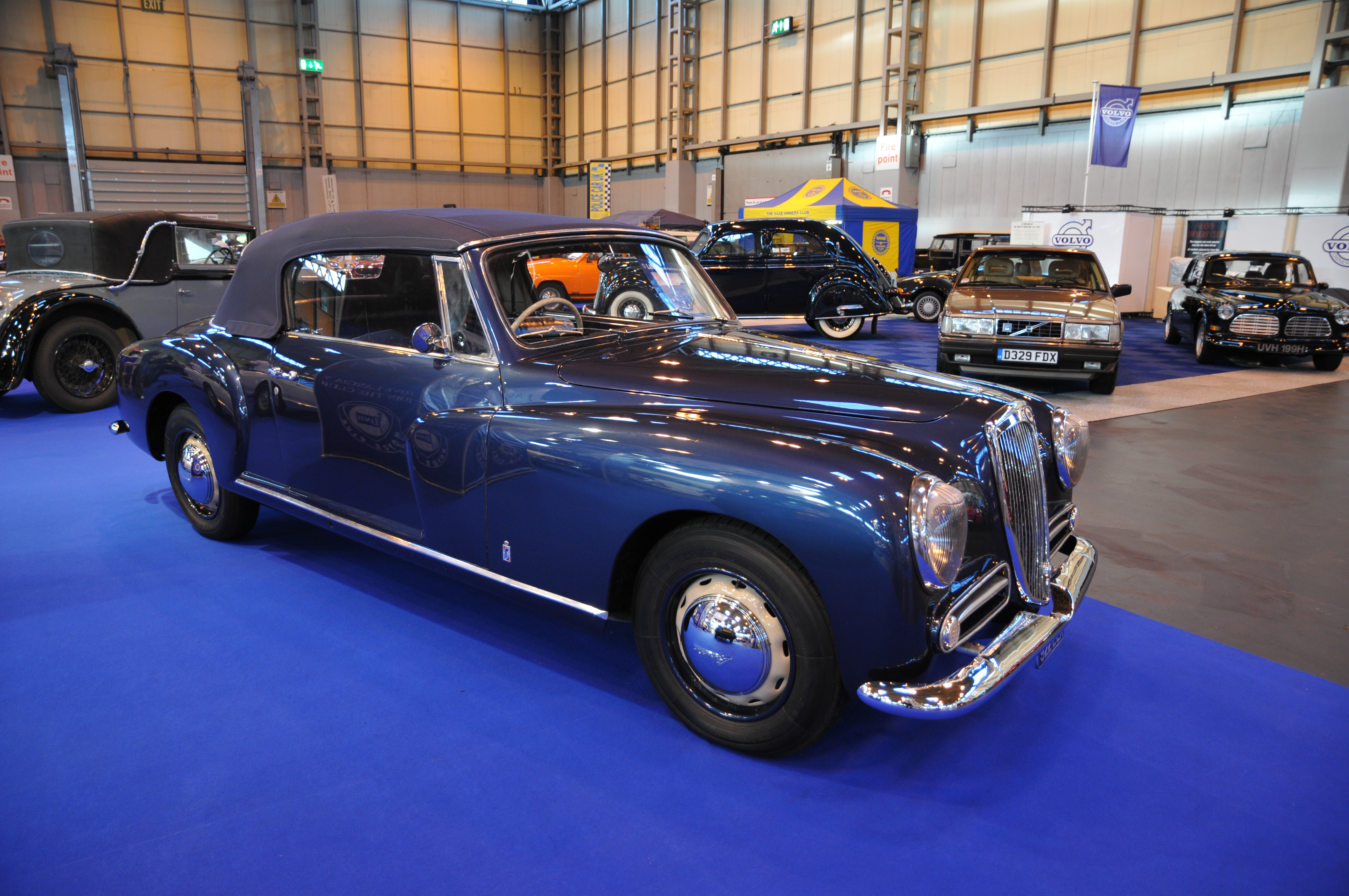 Lancia Aurelia B50 cabriolet by Farina c. 1950-1951